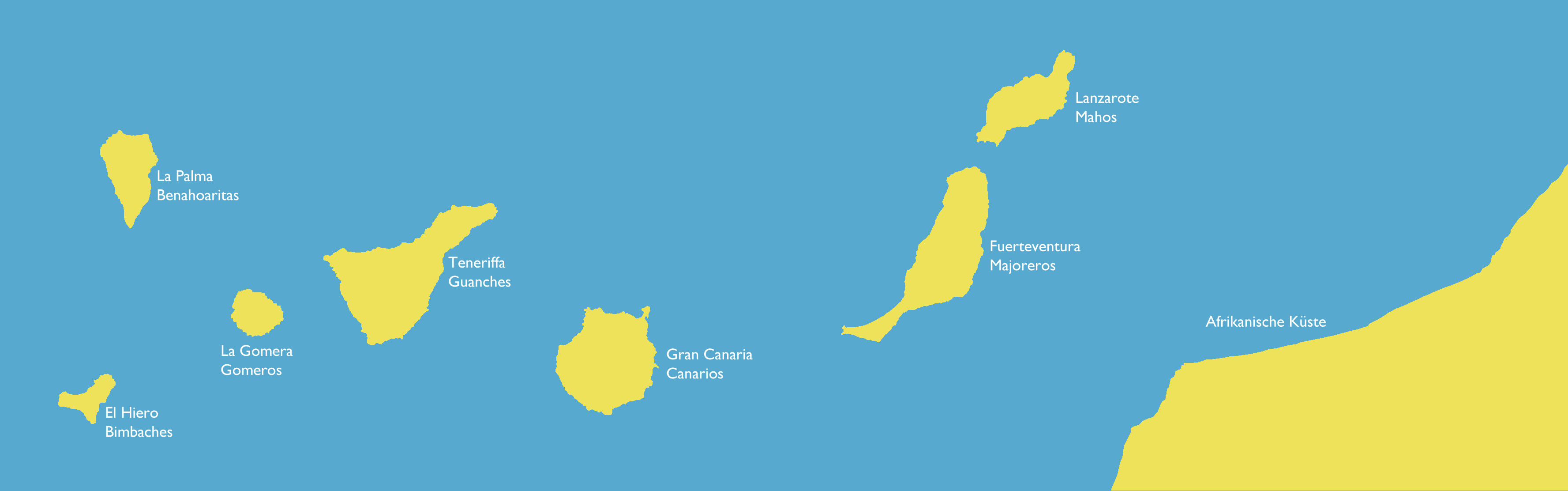 Bezeichnungen der Bewohner der Kanarischen Inseln